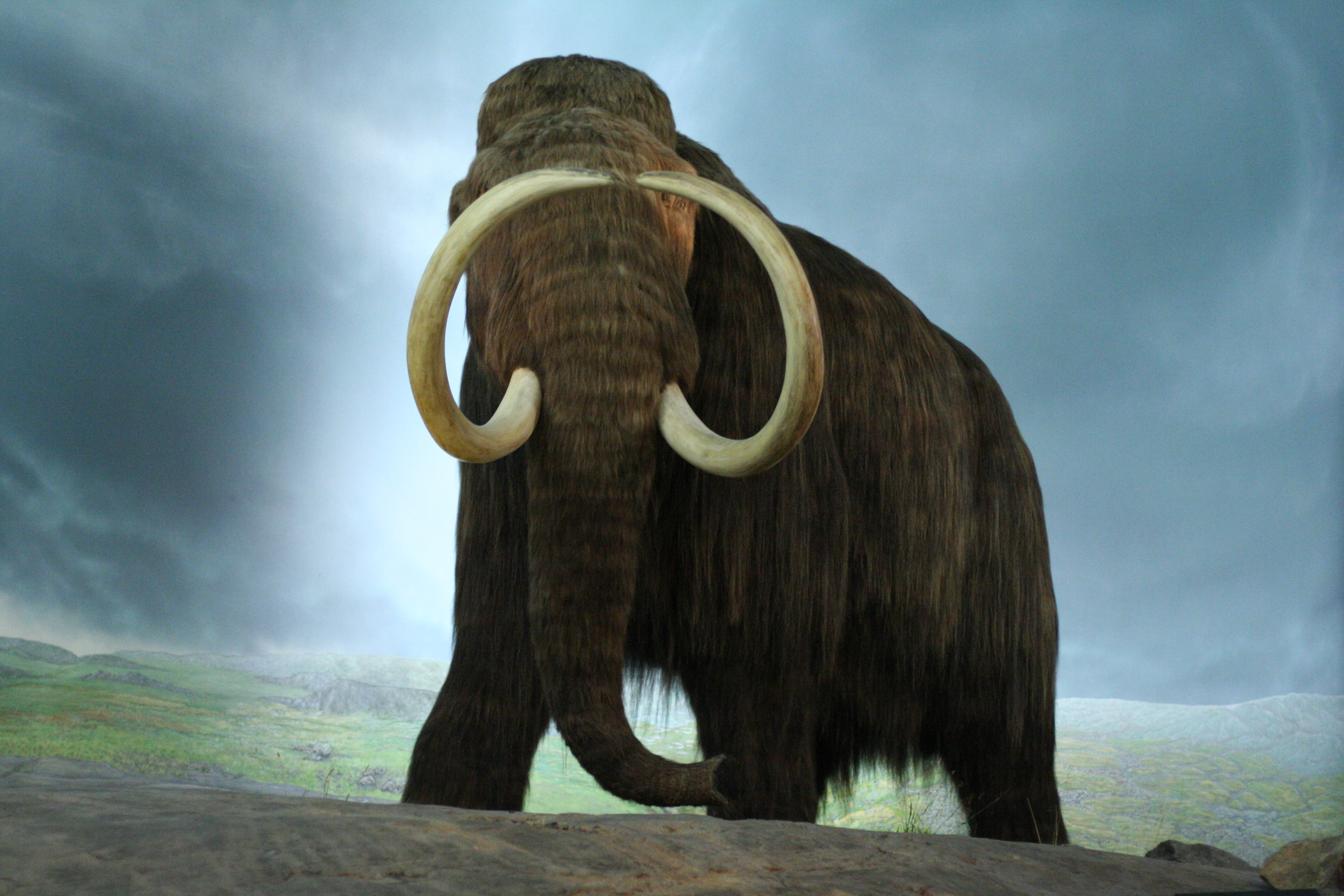 Royal Victoria Museum